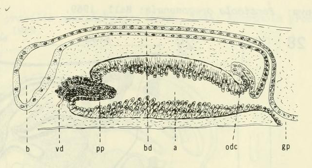 Reproductive system of Hymanella retenuova. Abbreviations: a, genital atrium or antrum; b, copulatory bursa or bursa copulatrix; bd, bursal duct, canal, or stalk ; gp, gonopore or genital aperture; odc, common oviduct or common ovovitelline duct; pp, penis papilla; vd, vas deferens or sperm duct. After Kenk (1955).